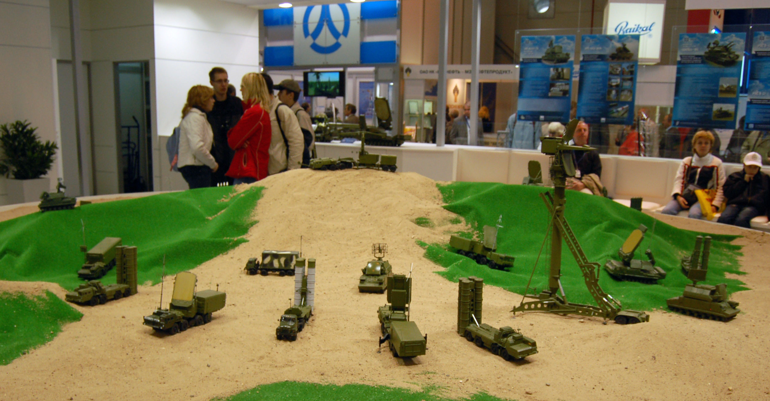 Макетная площадка концерна ПВО Алмаз-Антей в павильоне на МАКС-2009